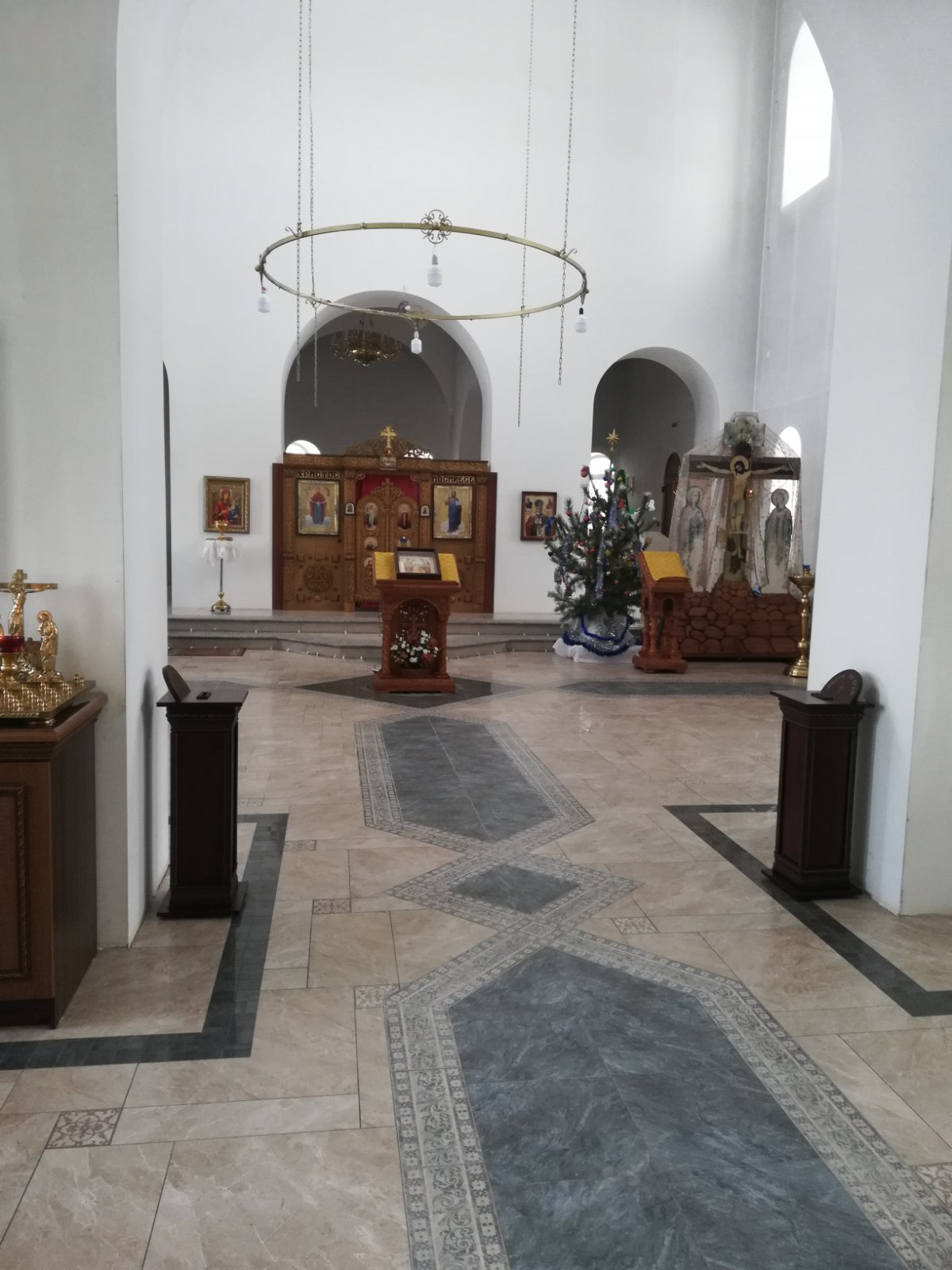 Церковь Покрова Пресвятой Богородицы в селе Косырёвка Липецкой области.